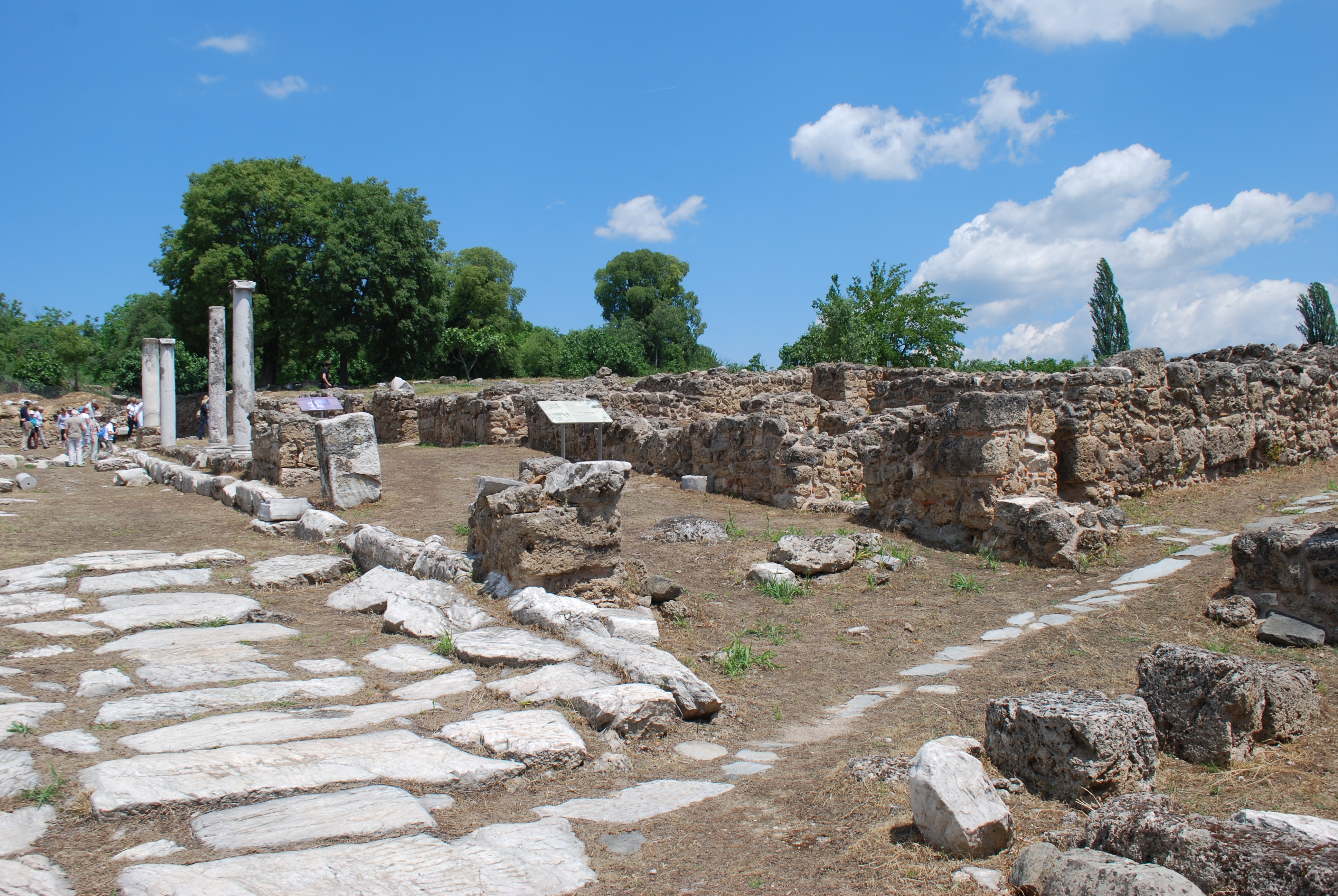 Vue du site archéologique de l'ancienne Edessa, en Macédoine (Grèce).